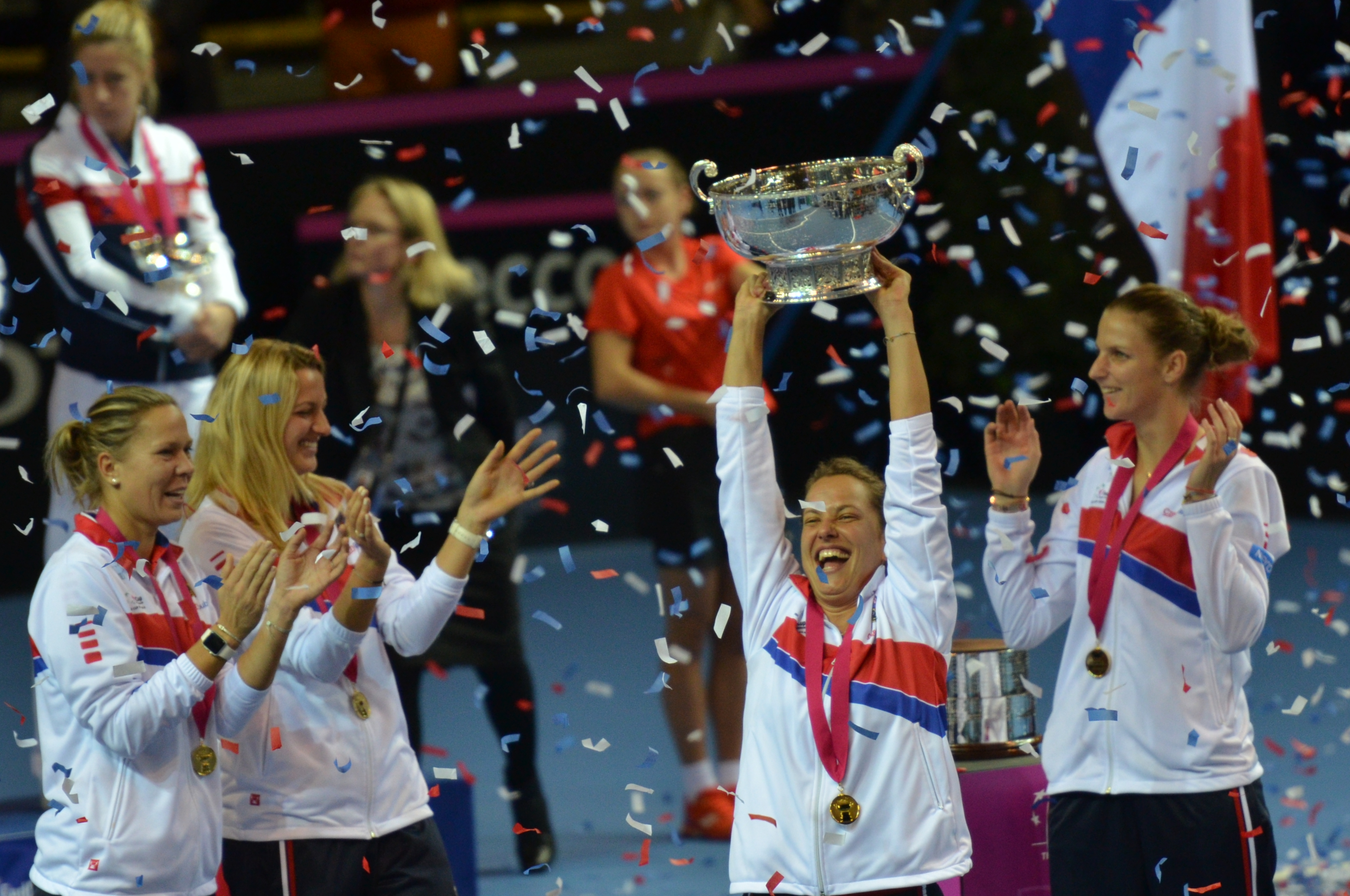 PPP_3519